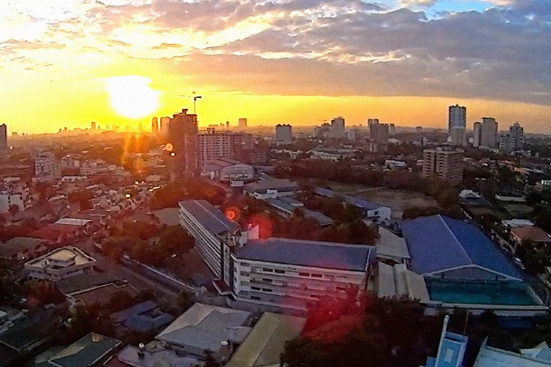 Xavier School Greenhills